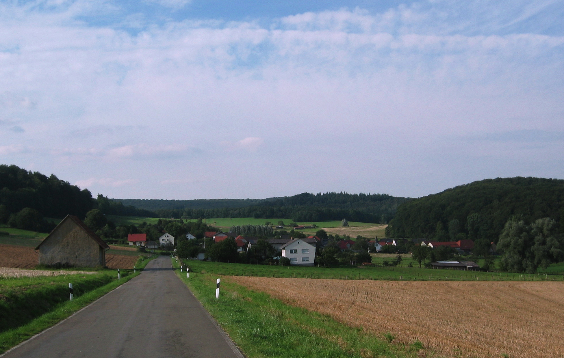 Blick von Süden auf Kühlsen, Bad Driburg, Deutschland.